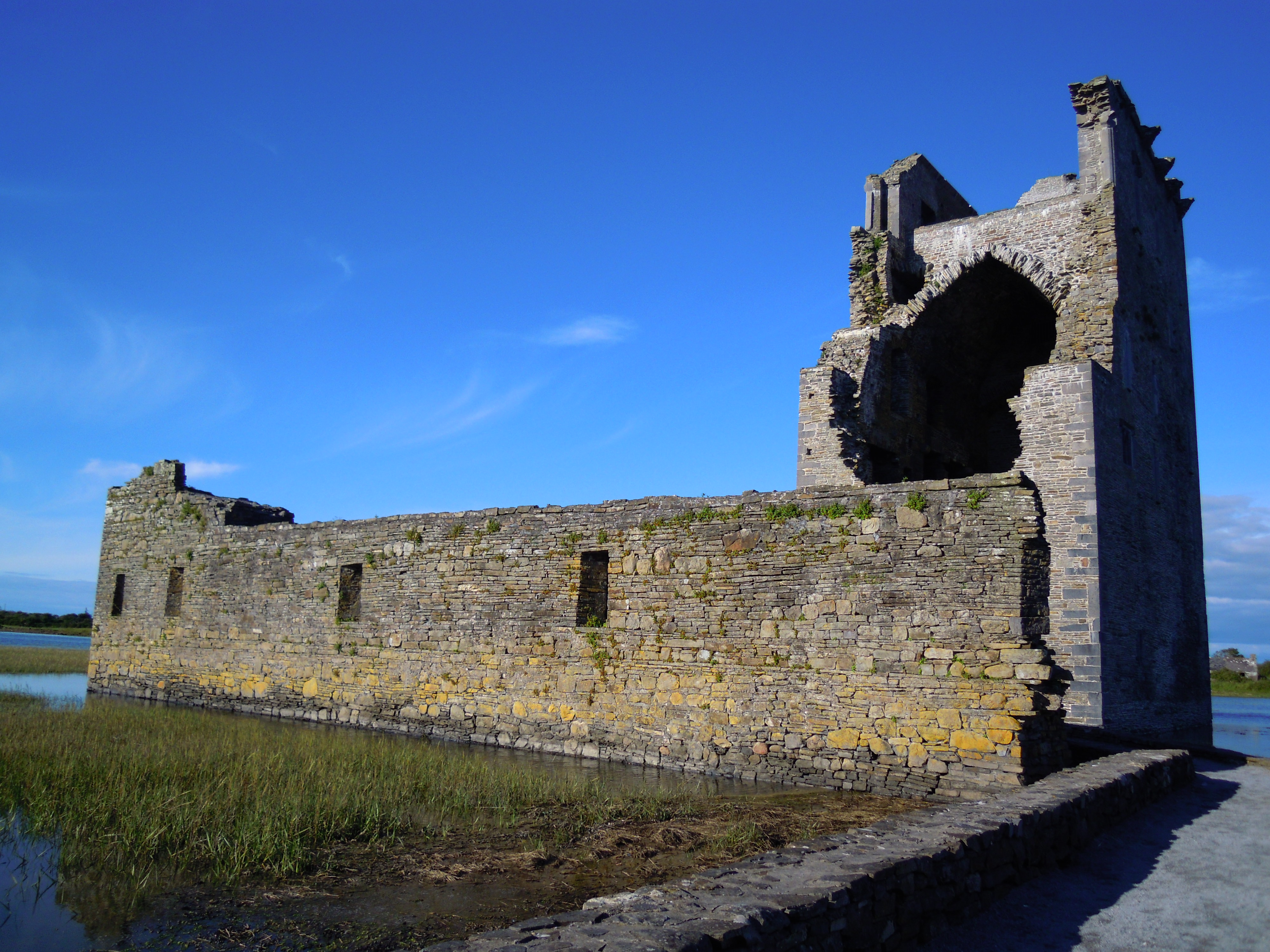 Antico e piccolo castello irlandese ormai in rovina, situato a Carrig Island.